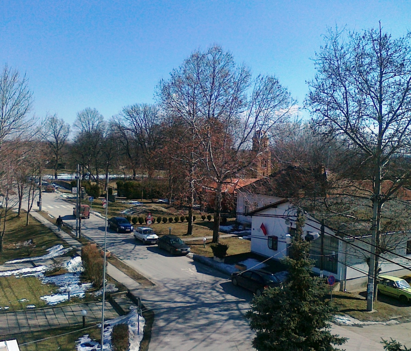 Мало Црниће - средиште